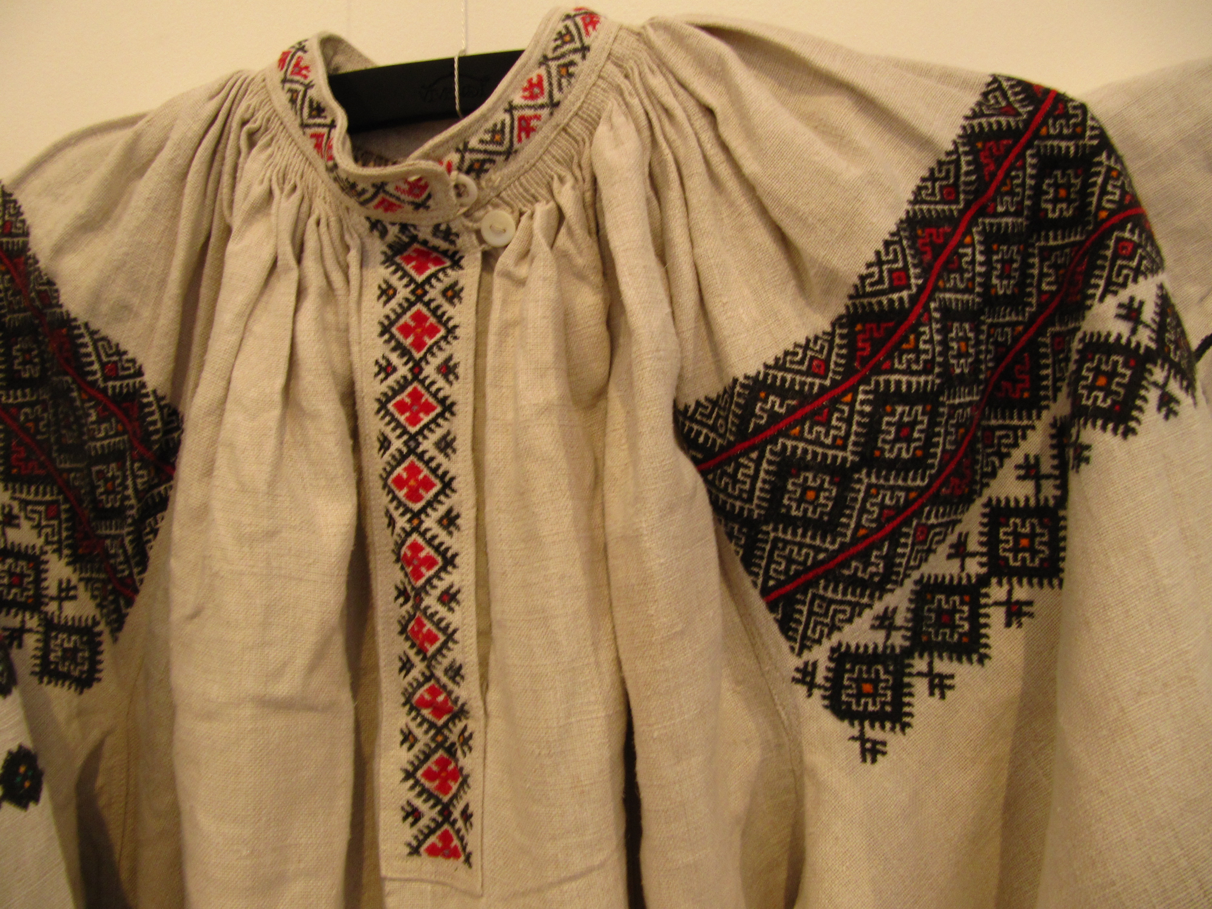 Жіноча сорочка до підточки. 1 половина 20 ст. Вінницька обл. Теплицький р. с. Орлівка. Виставка в музеї Івана Гончара (Київ).